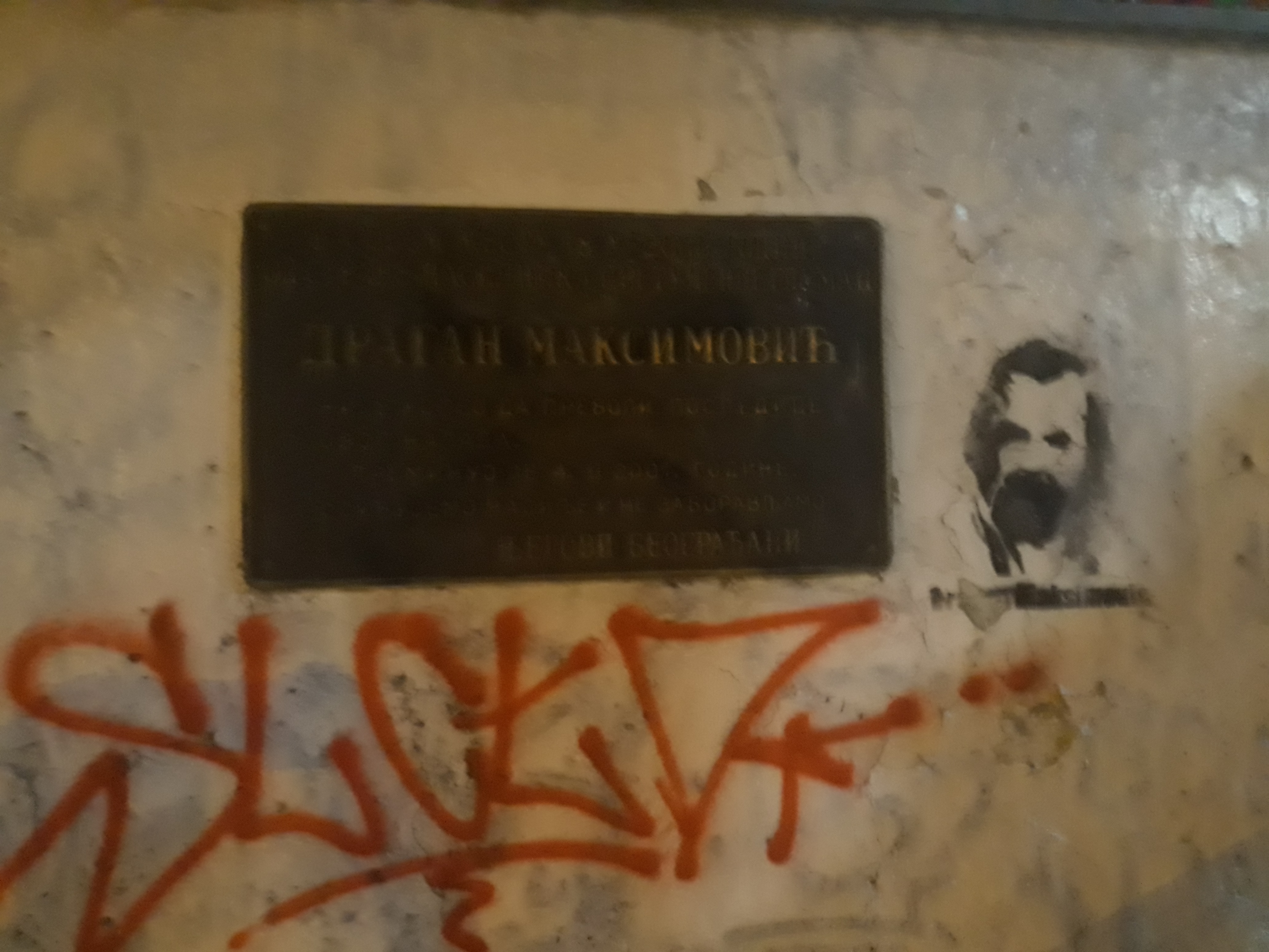 Спомен плоча глумцу Драгану Максимовићу на Зеленом венцу